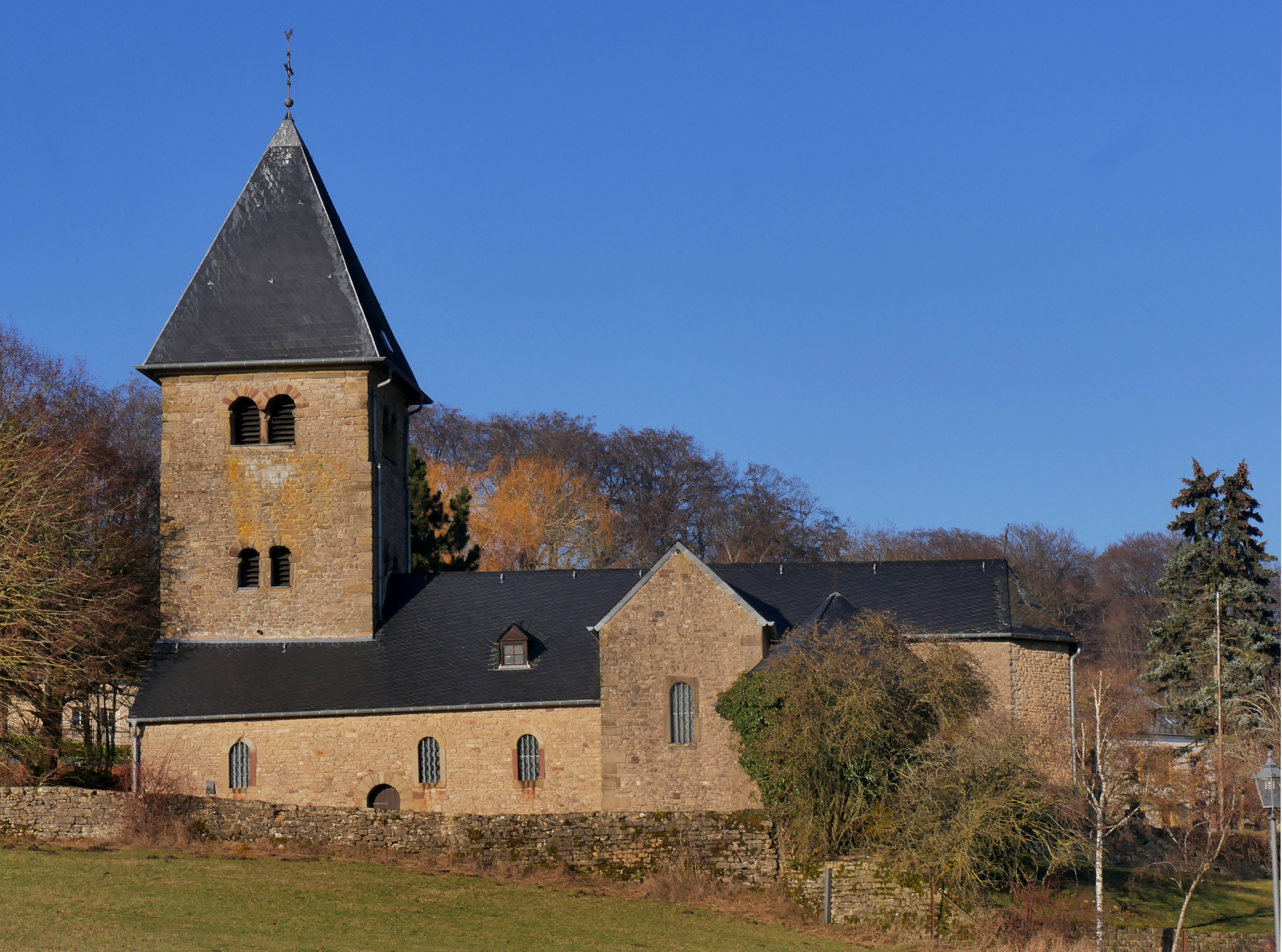 Marienwallfahrtskirche in Girsterklaus bei Rosport (Luxemburg), Aussenansicht von Nordosten